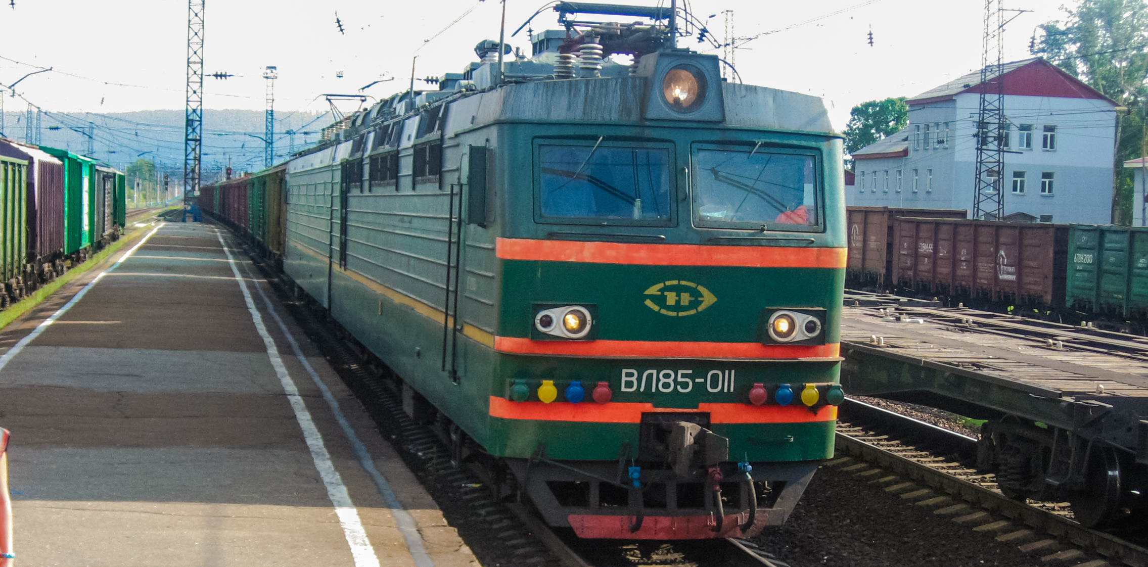 ВСЖД Иркутская область